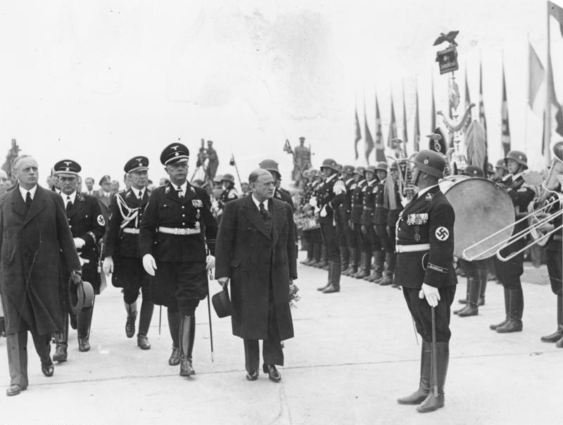 ADN-ZB/Archiv Faschistisches Deutschland 1933- 1945 Münchener Konferenz vom 29. September 1938: Der französische Ministerpräsidet [Edouard] Daladier schreitet vor seinem Abflug vom Flughafen Oberwiesenthal die Front der Ehrenkompanie der SS-Standarte "Deutschland" ab. Ganz links Reichsaussenminister [Joachim] v. Ribbentrop, Mitte der Polizeipräsident von München, Frhr. [Friedrich Karl] v. Eberstein. 30.9.38 [Scherl Bilderdienst]